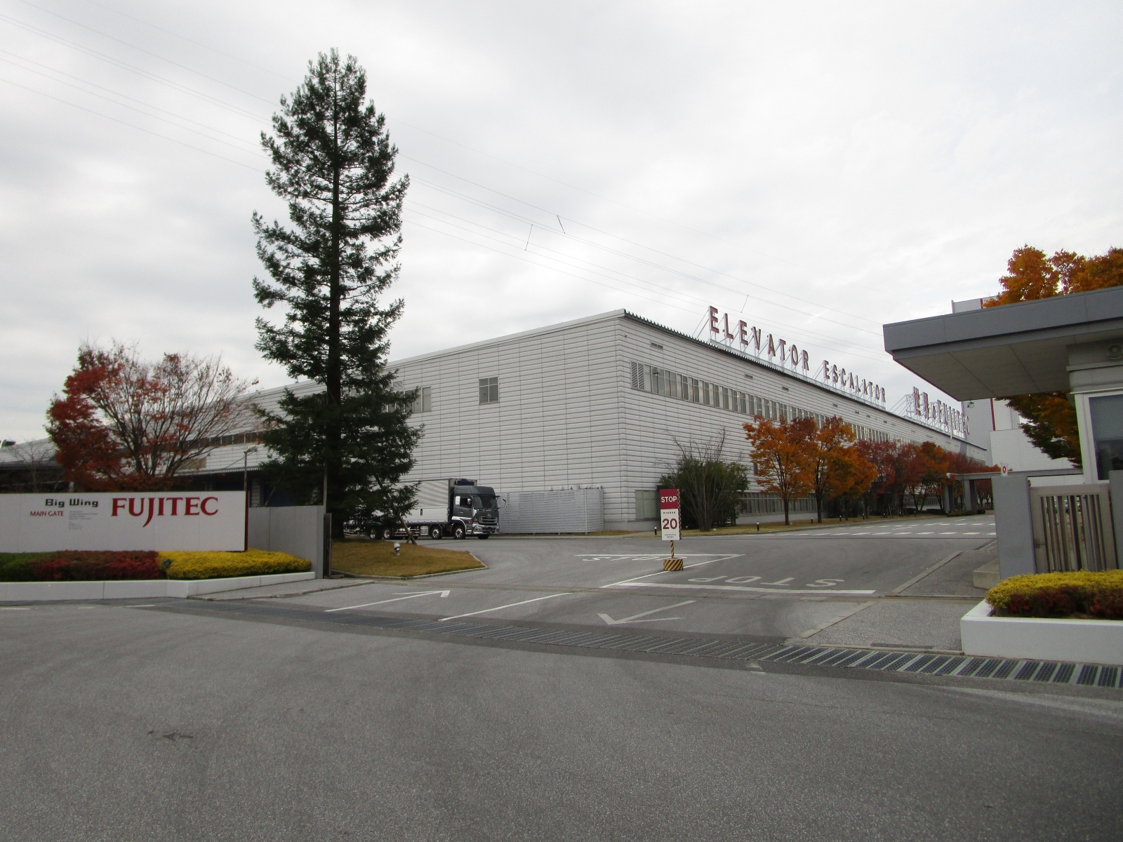 フジテック本社（ビッグウィング）正門